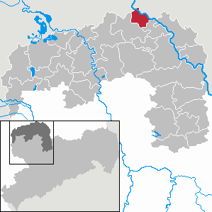 Dommitzsch in Saxony - Landkreis Nordsachsen